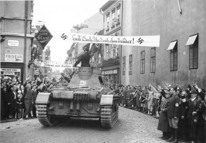 Einmarsch in das Sudetenland. Schwere Panzerkraftwagen auf der Fahrt durch die geschmückten Strassen Komotaus. Heavy German Tanks drive through the city of Komtau that is decorated for the occasion. 9.10.1938, 13.00 Uhr, Komtau. Sudetenland